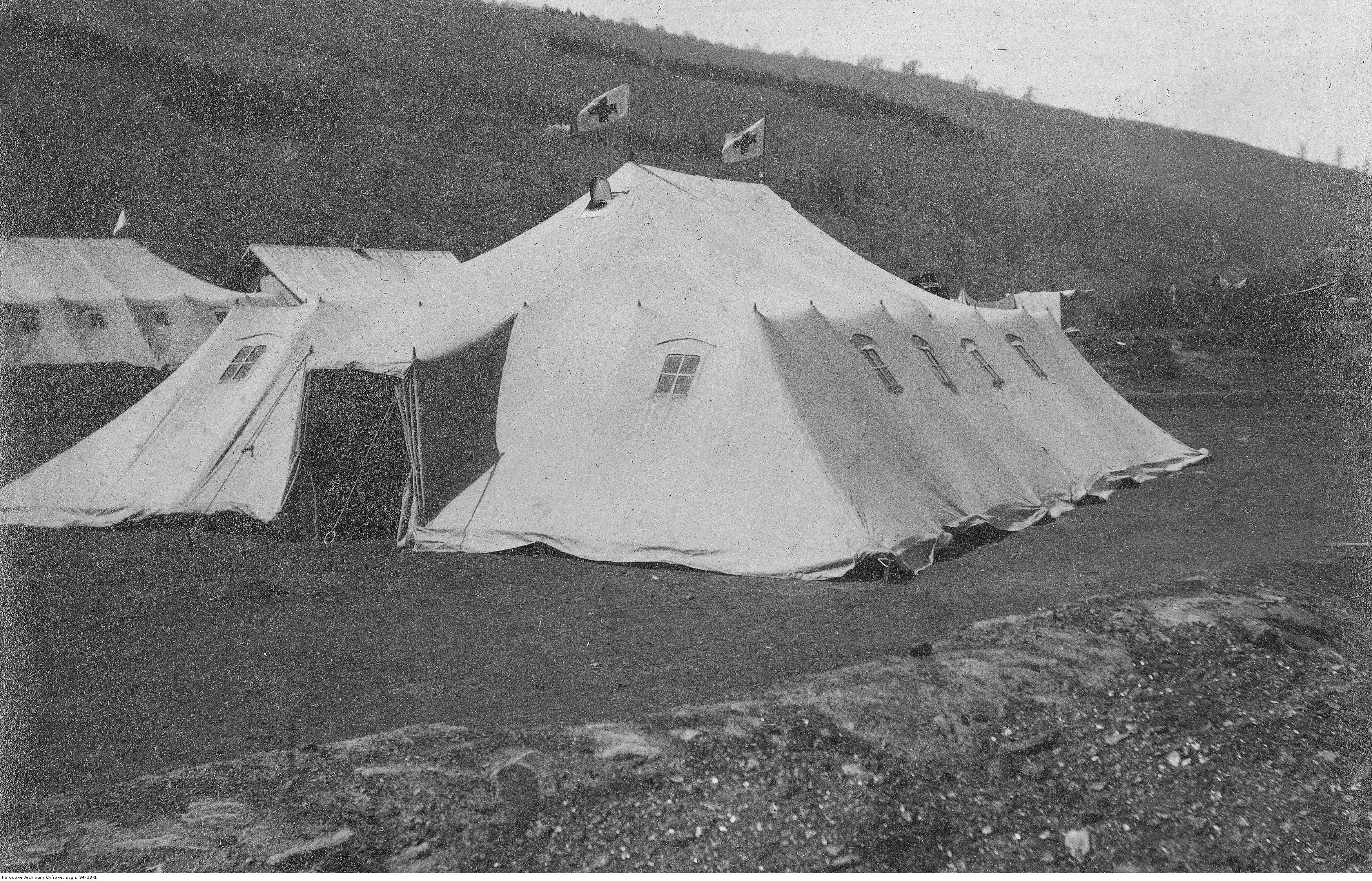 Namioty wojskowej służby zdrowia.